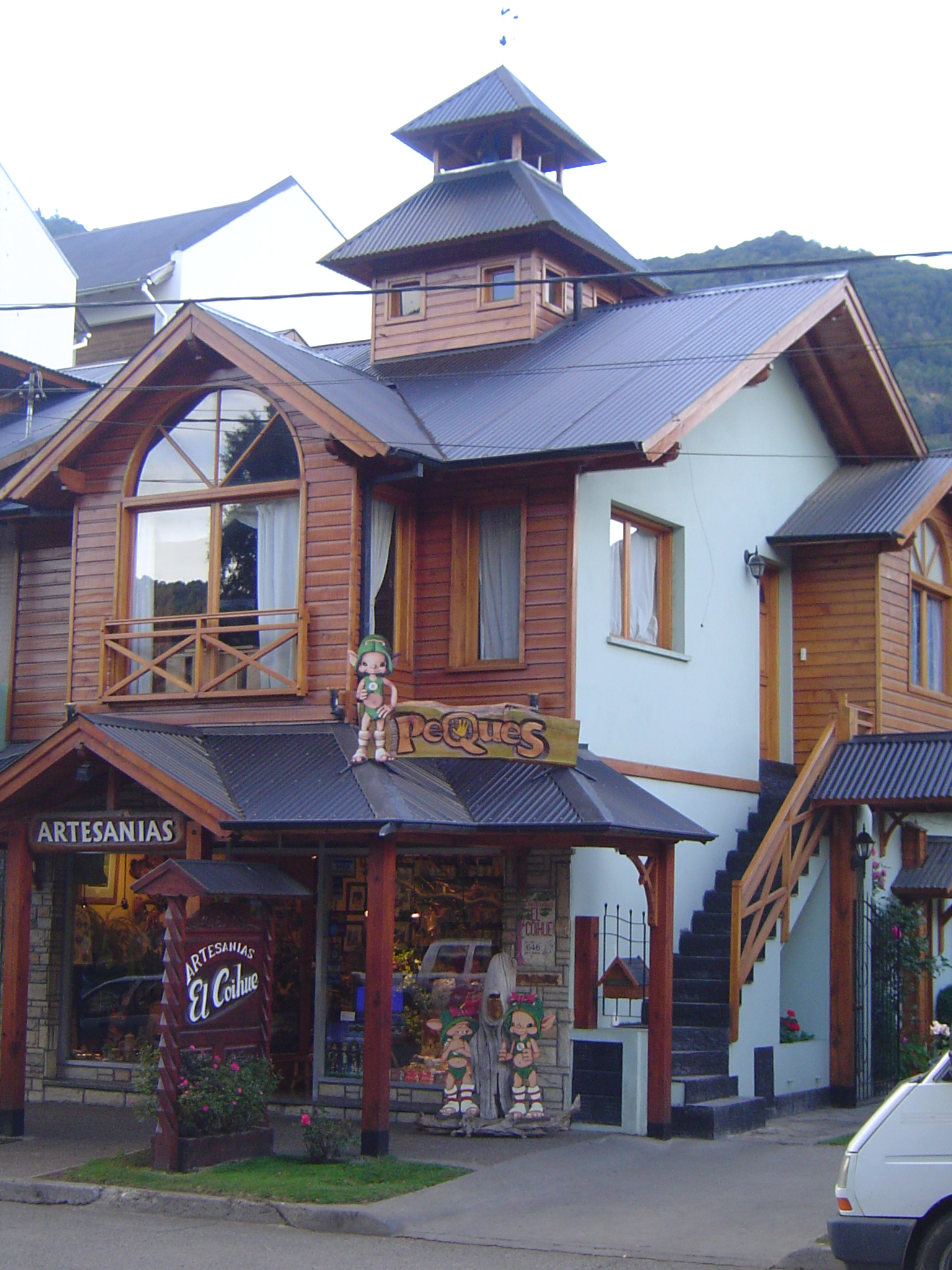 Una típica contrucción moderna de San Martín de los Andes. Techo a dos aguas, piedra y madera. 13 de marzo de 2007.